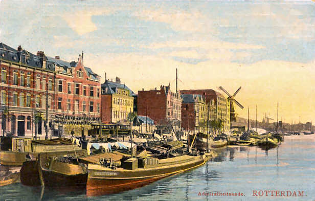 De Admiraliteitskade en Oliemolen De Reus (1690-1905) in de Rotterdamse wijk Struisenburg. Foto van prentbriefkaart, fotograaf onbekend